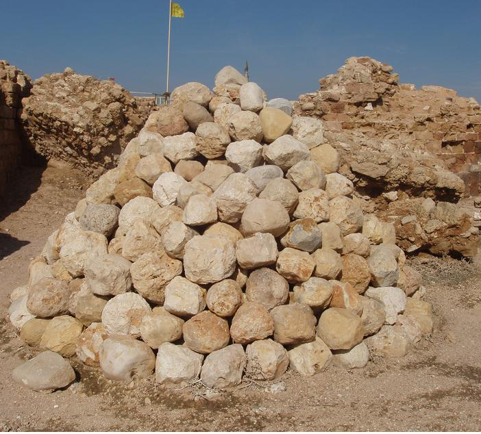 אבני קלע